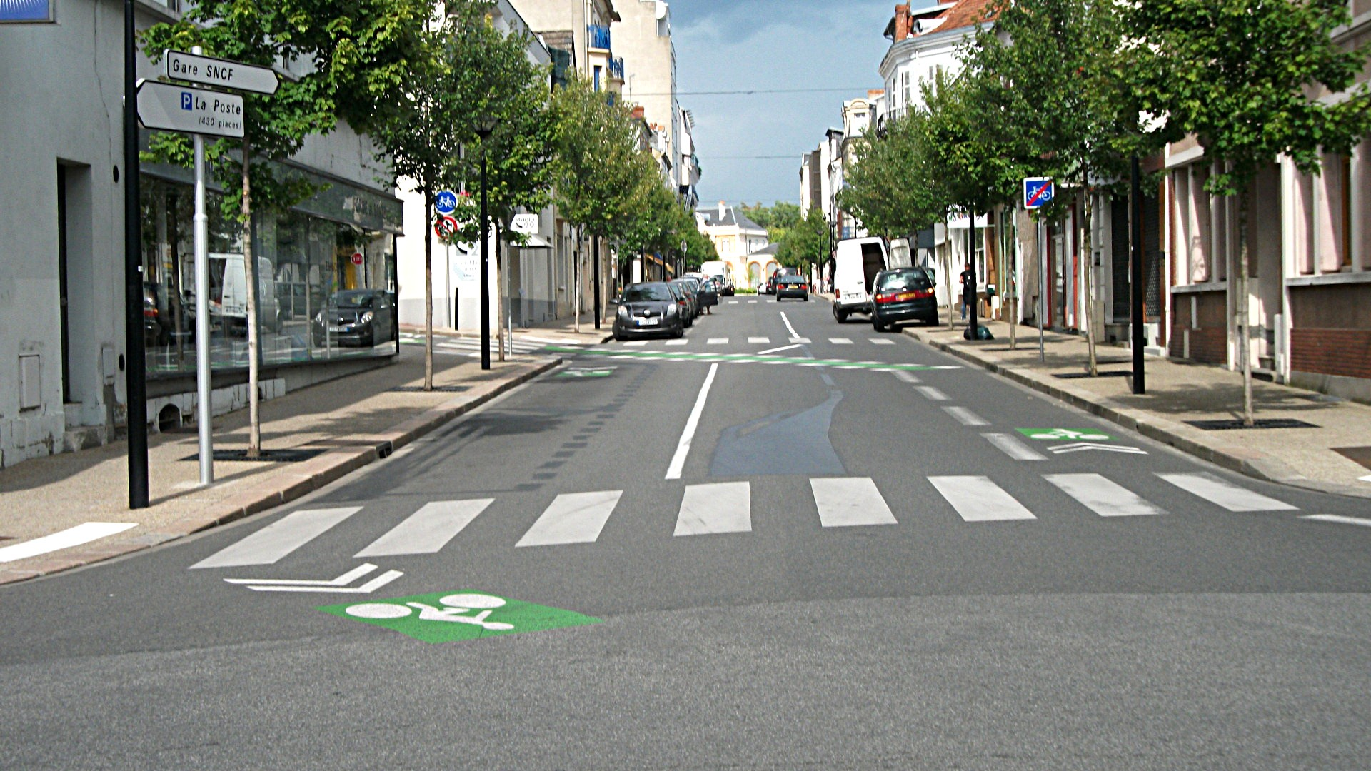 L’avenue du Président Doumer en direction de la Gare SNCF. Cette rue est à deux sens de circulation, dont l’aménagement de cette avenue a été légèrement modifié suite à l’itinéraire cyclable créé fin juin 2011. En direction de la gare SNCF, une bande cyclable est tracée jusqu’au panneau C114 et une traversée vers la rue Laprugne est tracée. En venant de la gare SNCF, il n’était pas possible de tracer une bande cyclable : les cyclistes sont en voie partagée avec tout le reste de la circulation automobile. Les deux voies sont séparées par une ligne continue. Panneaux visibles : Fabricant Lacroix signalisation, revêtement rétroréfléchissant de la classe 1. Ensemble de panneaux D21b (2010) : Gare SNCF (qui aurait dû posséder l'idéogramme ID12a), La Poste (430 places) (précédé de l'idéogramme ID1a) Panneau C114 (2011) Panneaux de la rue Laprugne : Voir File:Rue Laprugne à Vichy 2.jpg